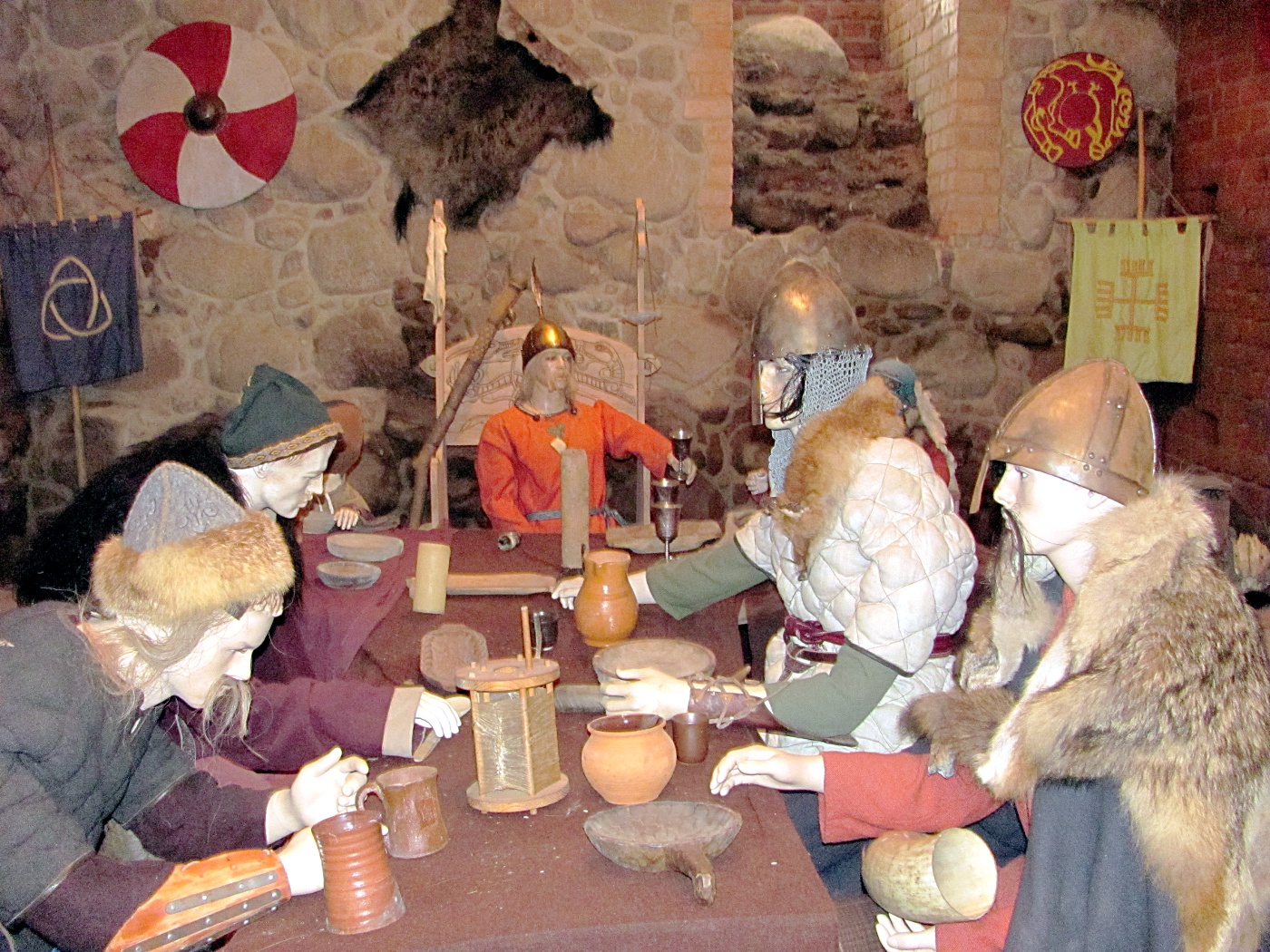 Kruszwica - ruiny zamku, tzw. Mysia Wieża, poł. XIV w.